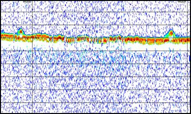 Zelf gemaakt